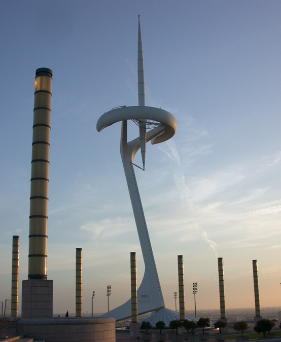 Torre de comunicacions de Montjuïc, Barcelona